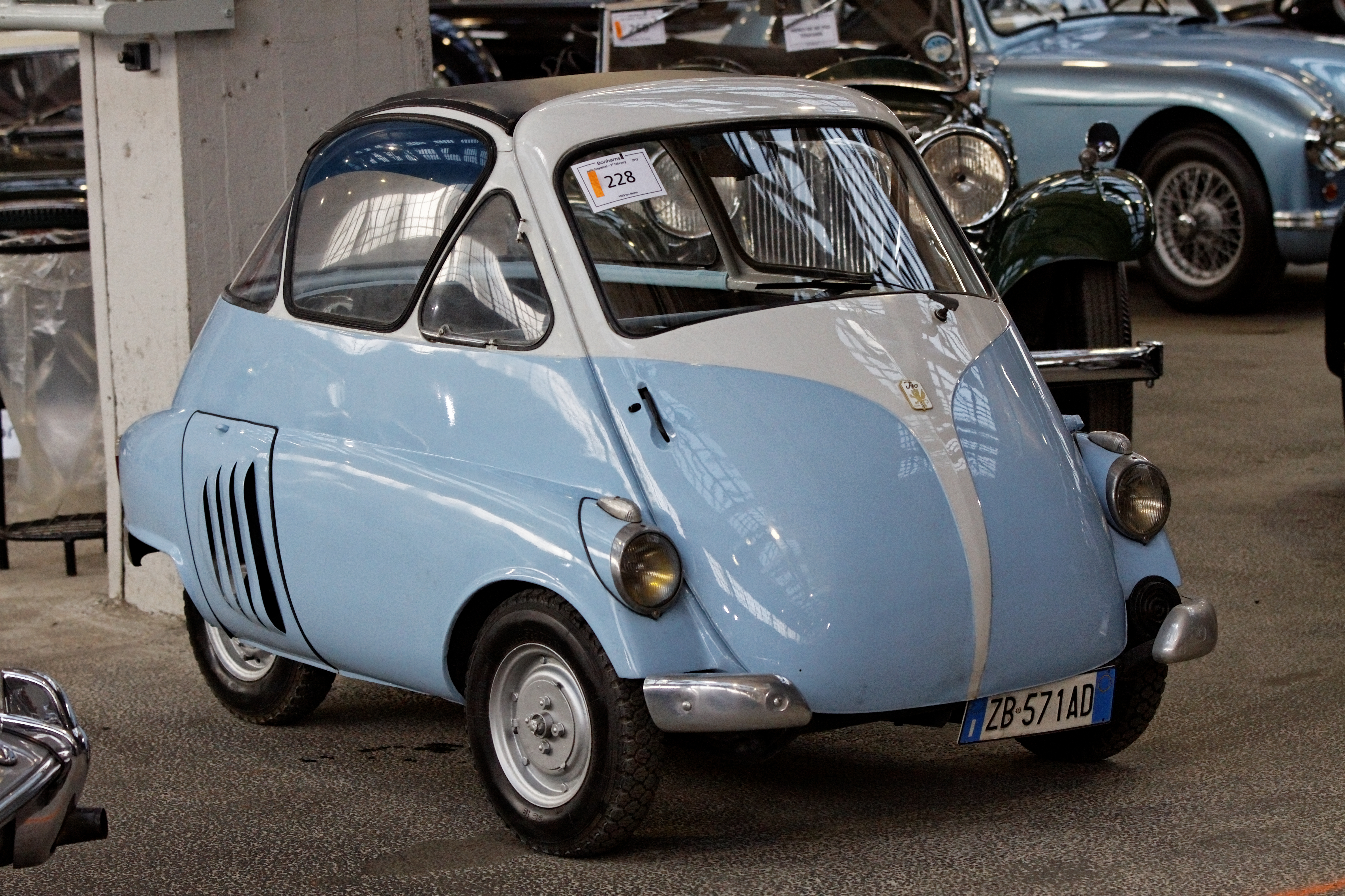 Iso Isetta